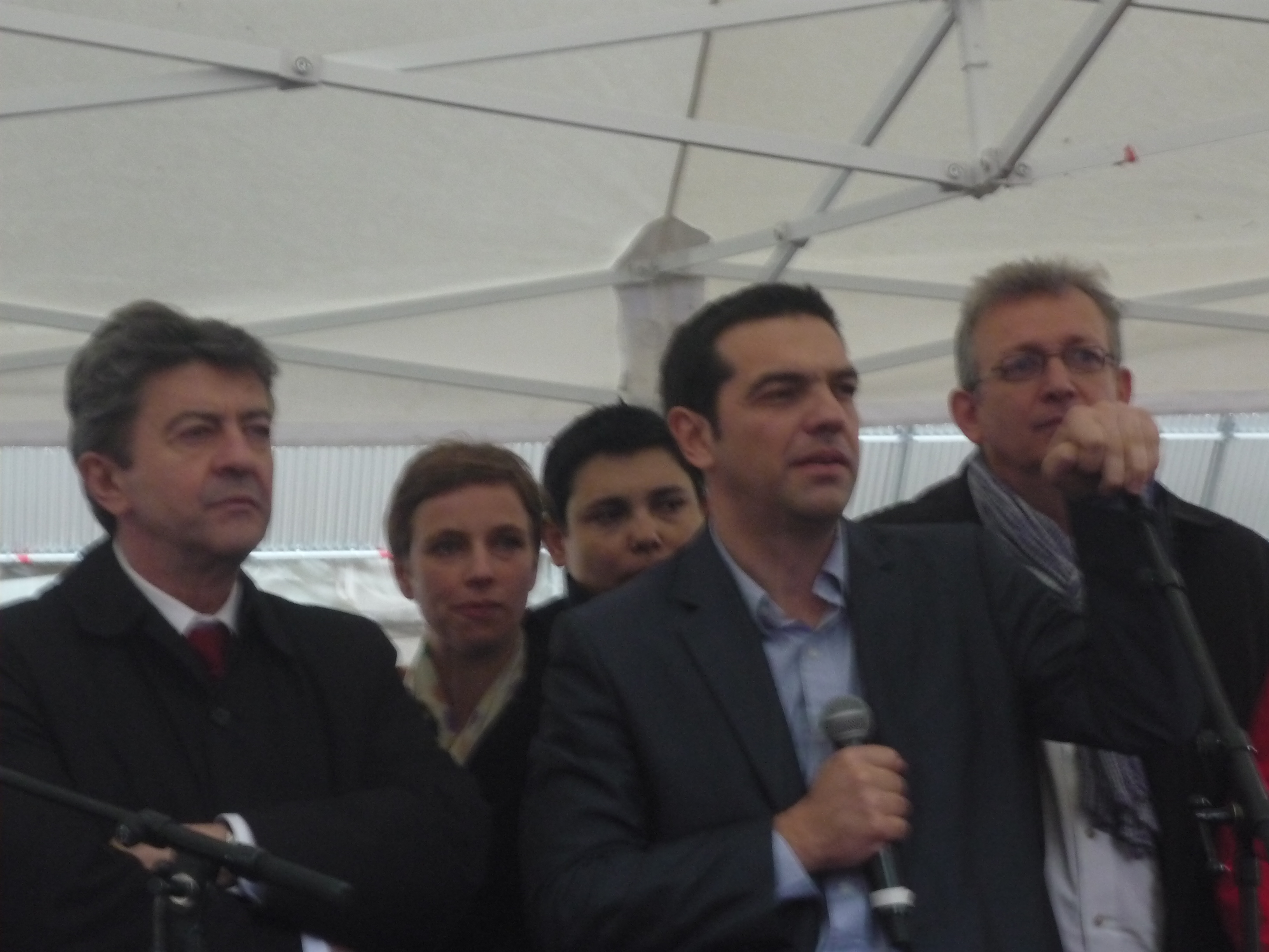 A la tribune du meeting commun Syriza-Front de Gauche place Edouard Herriot à Paris le 21 mai 2012, de gauche à droite : Jean-Luc Mélenchon, Clémentine Autain, X, Alexis Tsipras, Pierre Laurent.